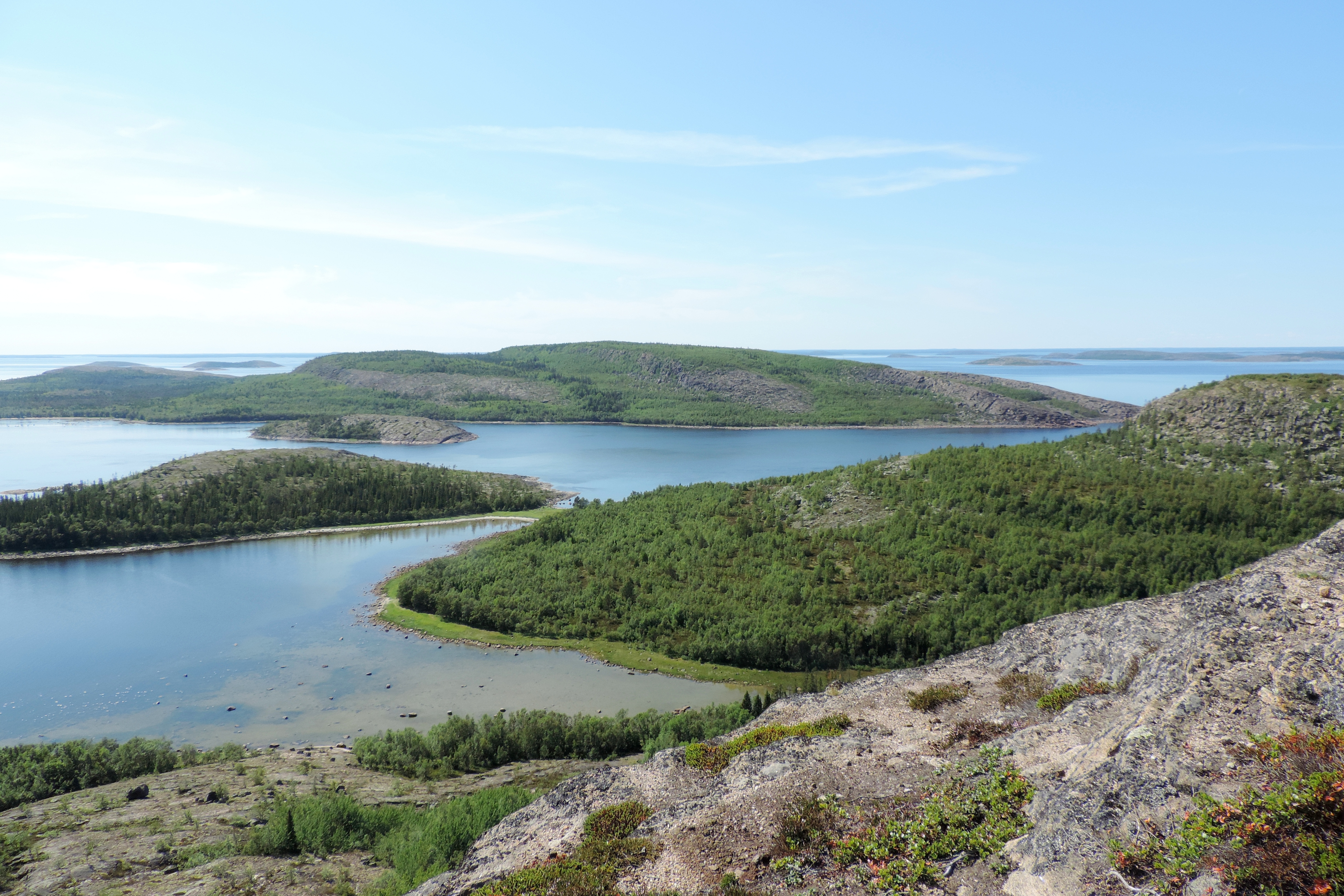 Кузова заказник, Кемский район This image is related to the protected area of Russia number 1010012